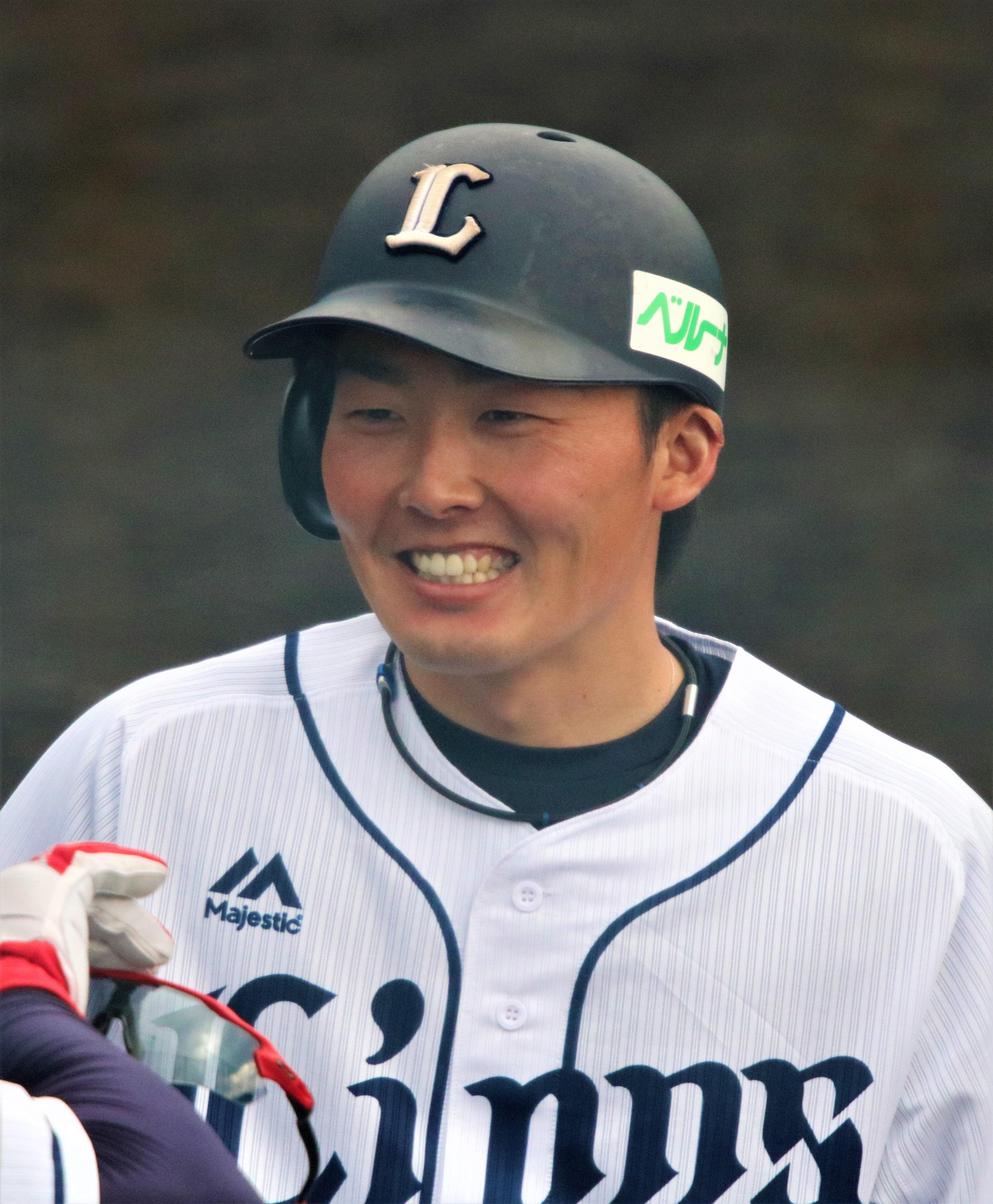 2018年2月9日